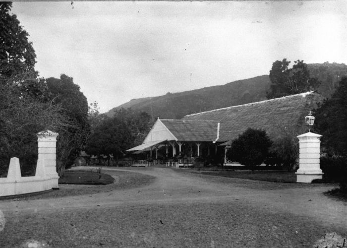 Foto. De residentswoning te Ambon, Molukken.